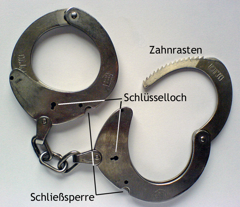 Handschellen mit Beschreibung